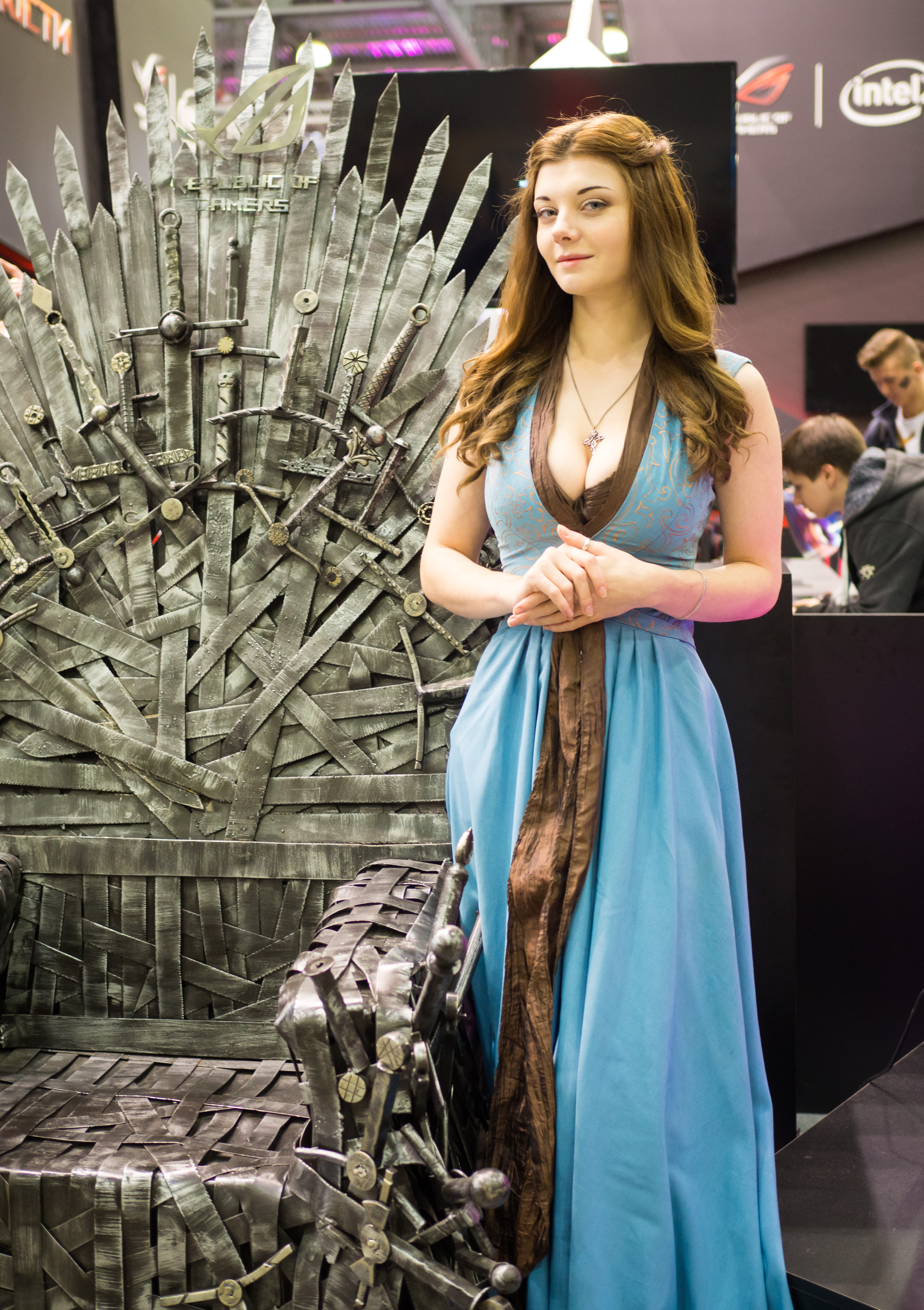 day 2